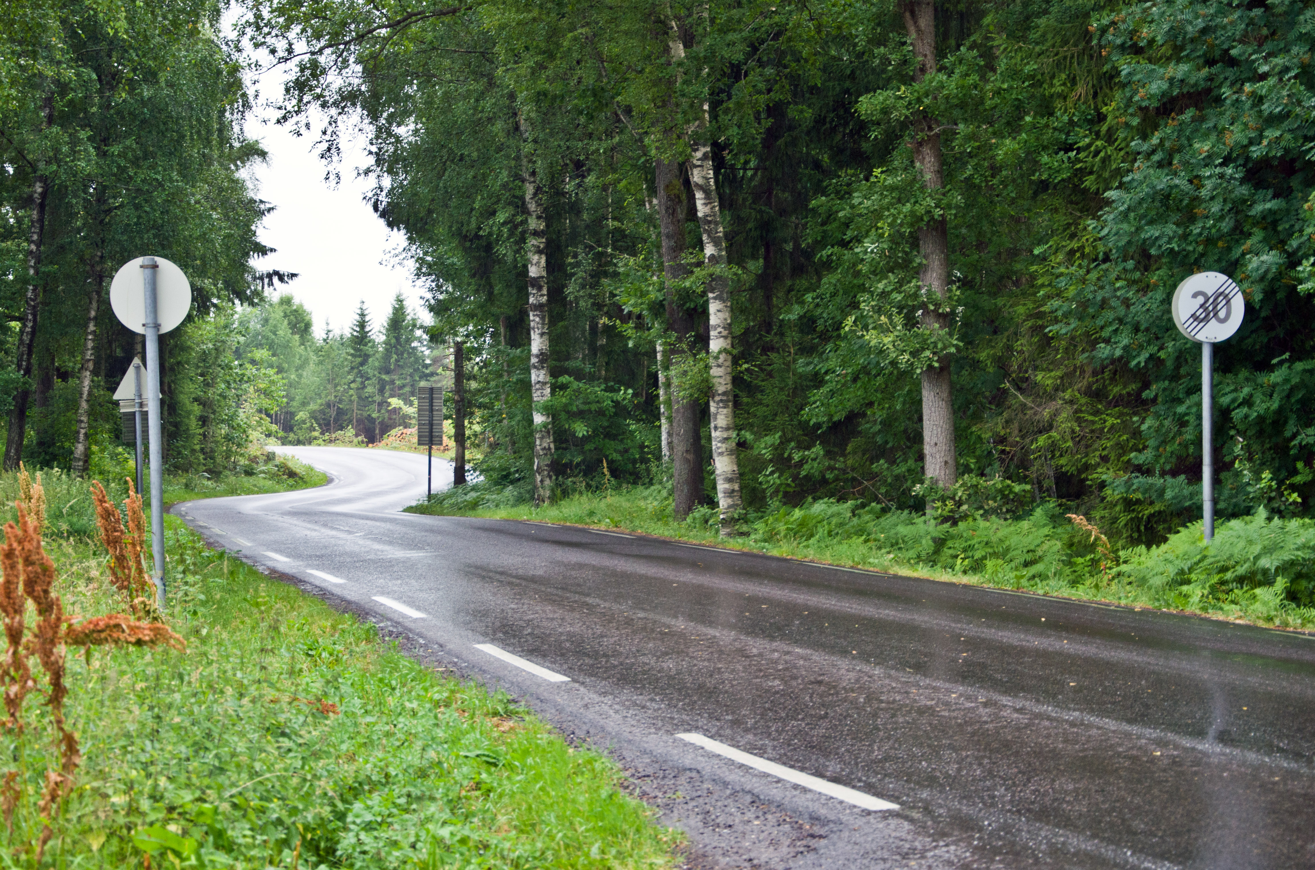 Fylkesvei 529 Syrbekkveien, Tønsberg, Vestfold